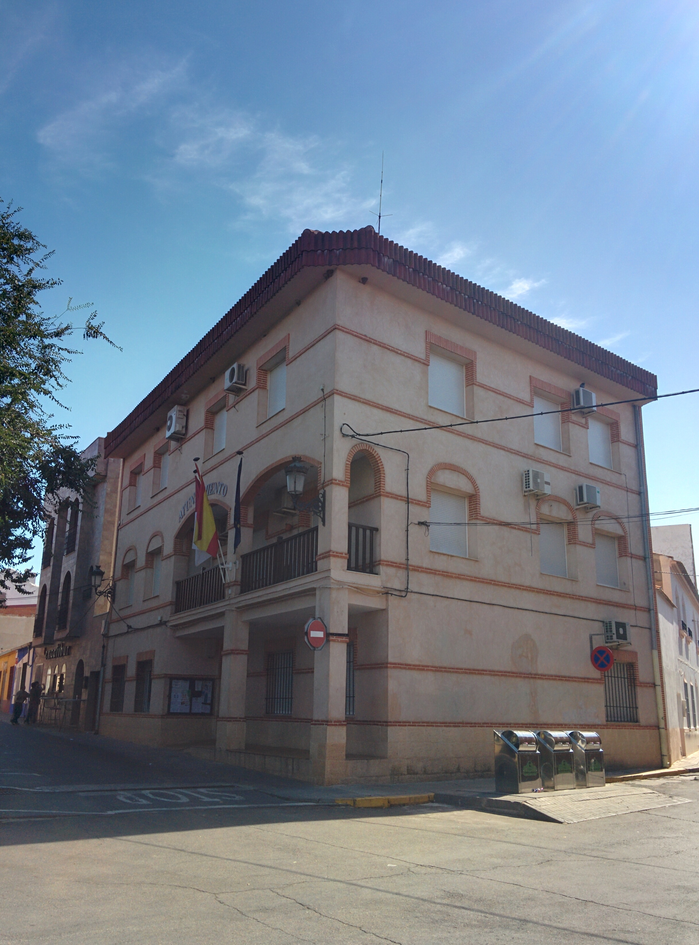 Casa consistorial de Fuente el Fresno (Ciudad Real, España).